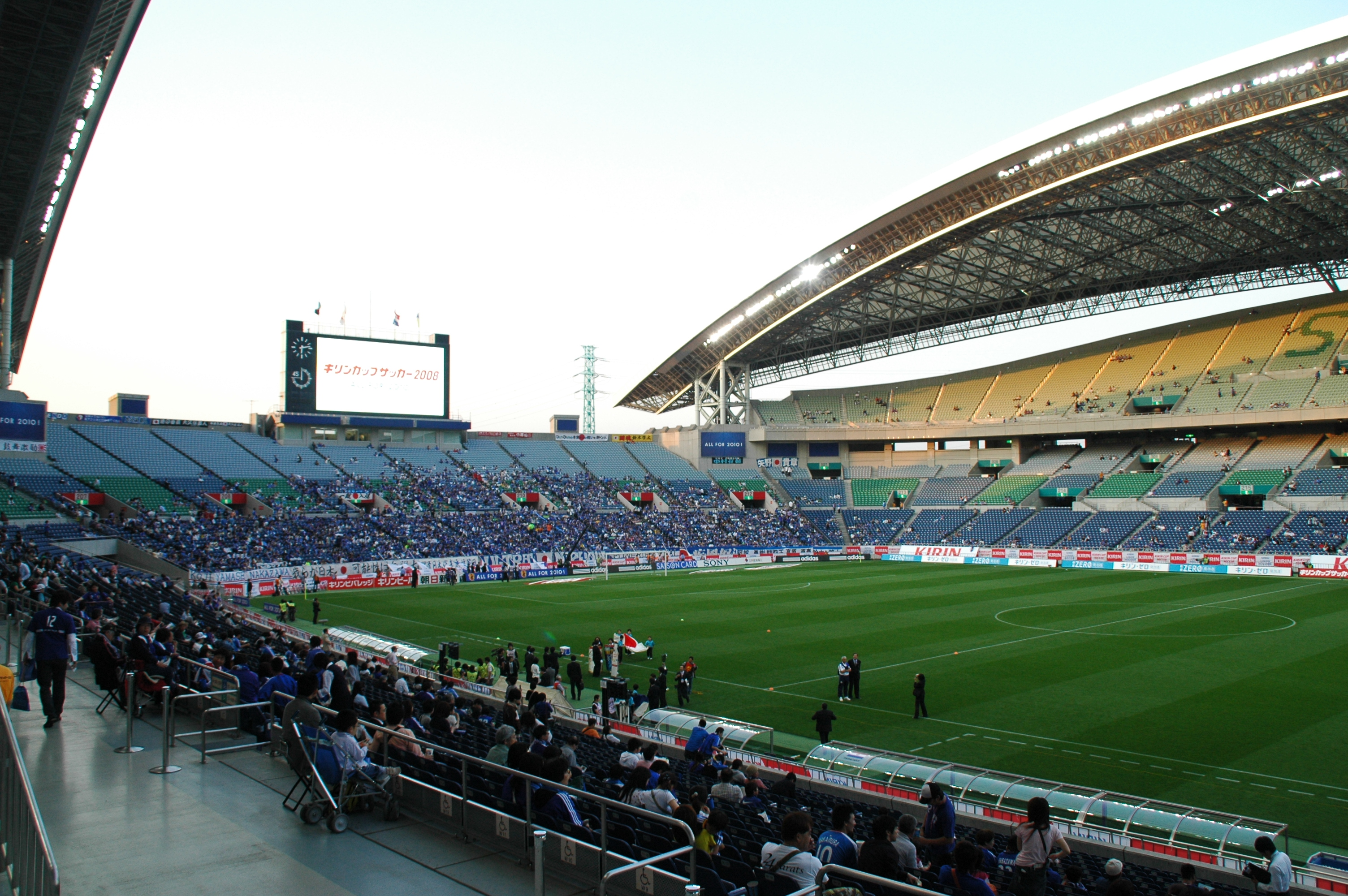 日本代表 VS パラグアイ代表＠埼玉スタジアム2002